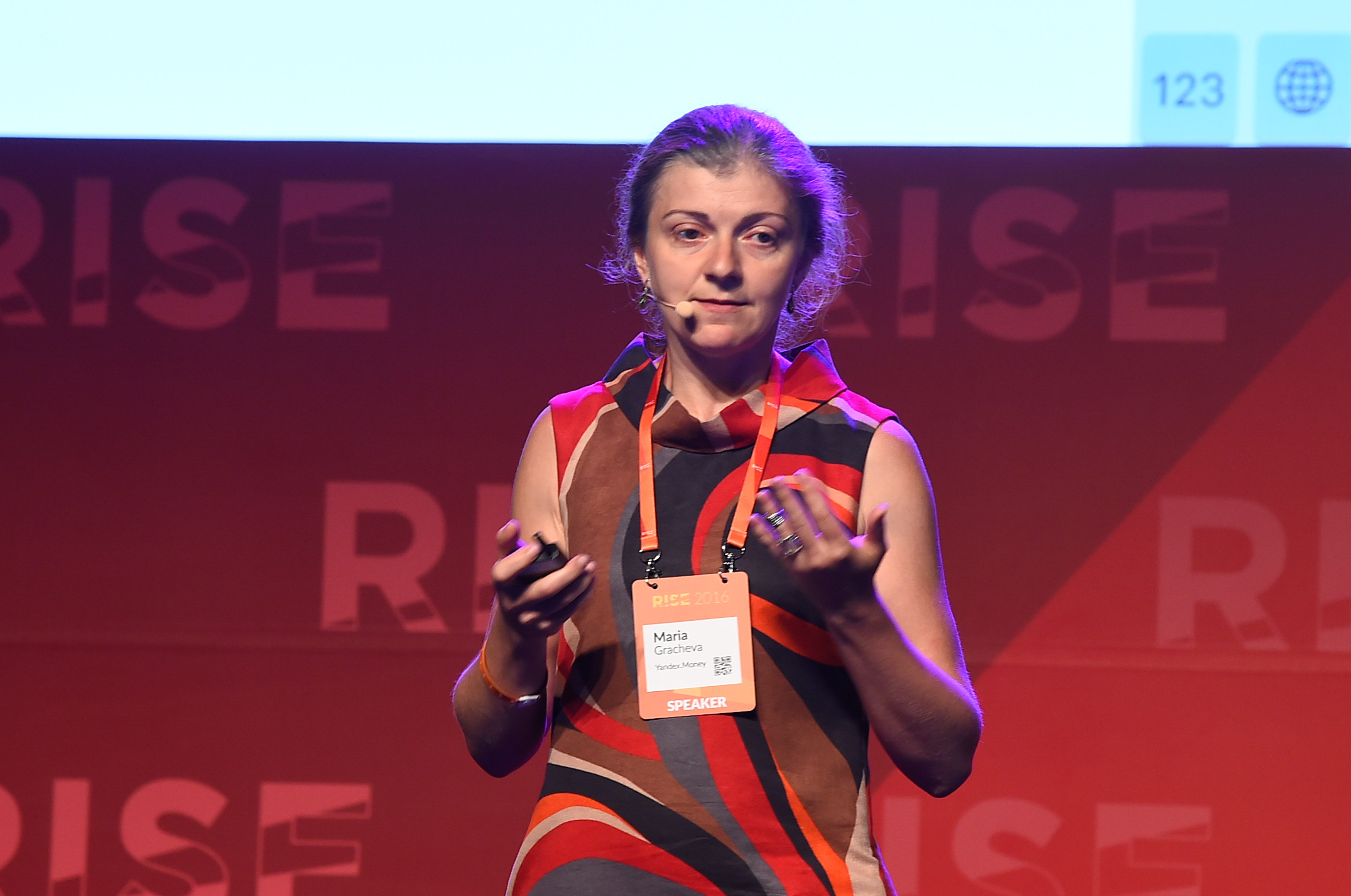 Гендиректор Я.Денег Мария Грачева на конференции Райз-2016